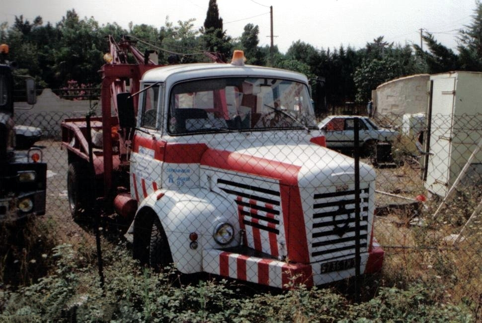 Berliet Abschleppwagen (Löschen) (Aktuell) 14:34, 27. Nov 2004 . . Bleichi (Diskussion) . . 970 x 650 (145204 Byte) (Berliet Abschleppwagen - selbst fotografiert - GNU-FDL)